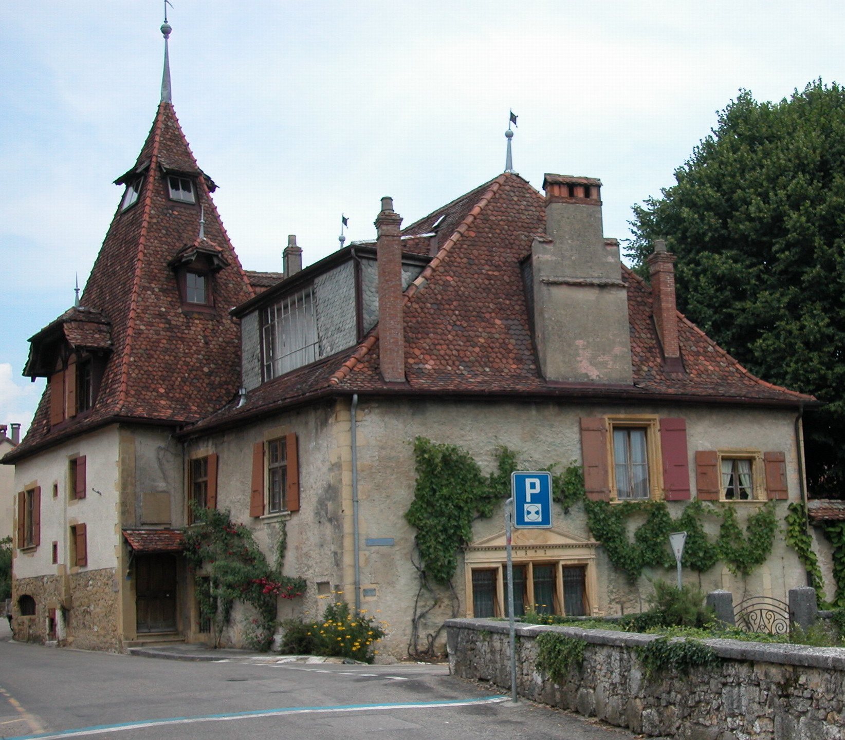 Vue des façades nord et ouest de la maison du peintre Gustave Jeanneret